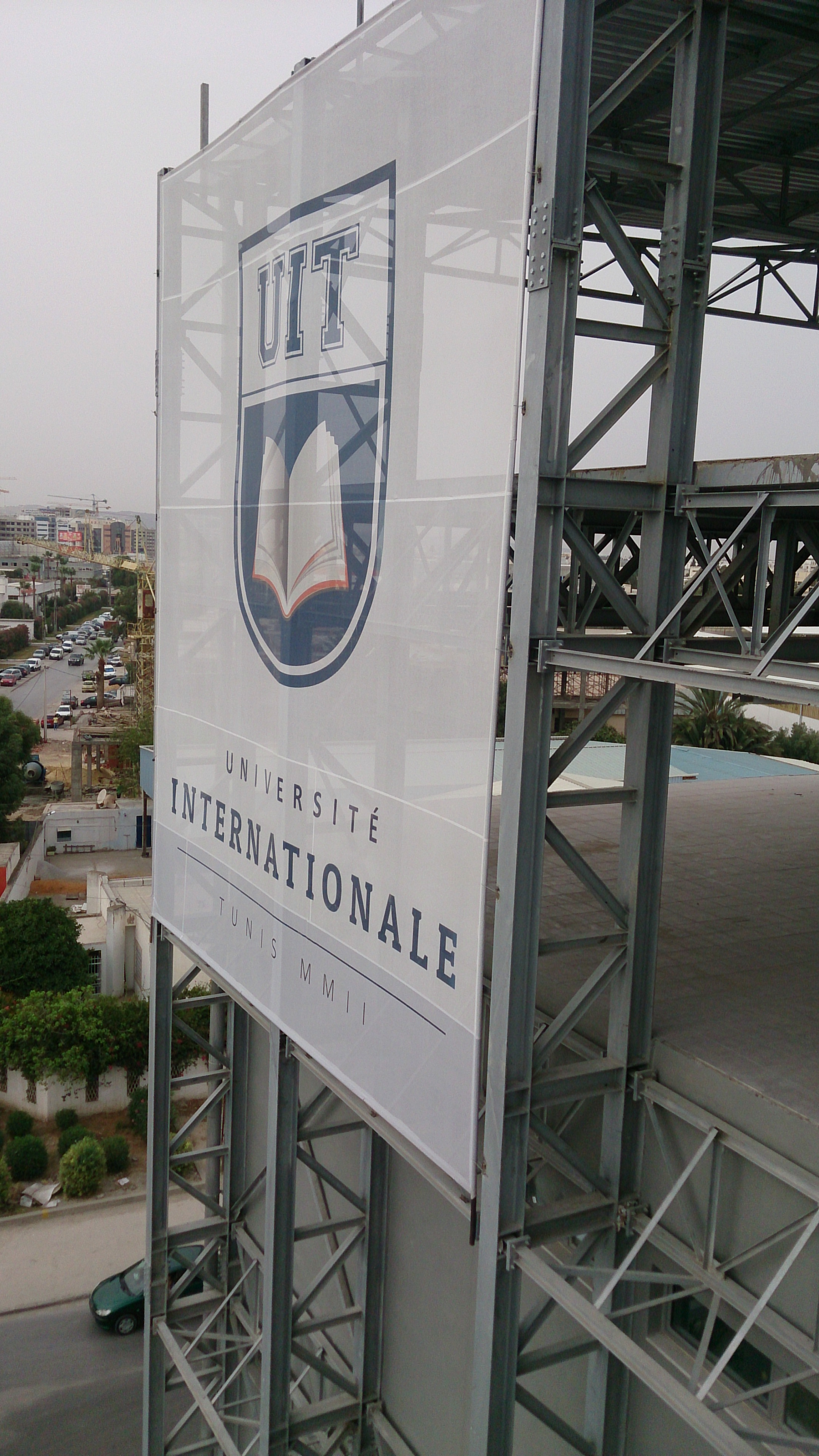 Affiche de l'Université Internationale de Tunis au Campus de la Charguia 1